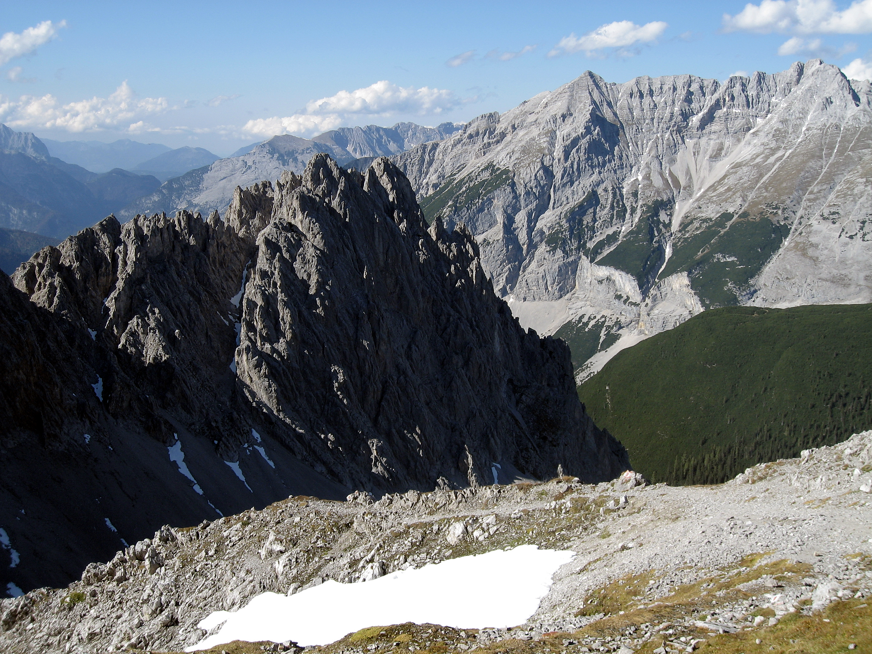 Österreich, Innsbruck, Hafelekar, Blick auf die von Innsbruck abgewandte Seite des Hafelekar